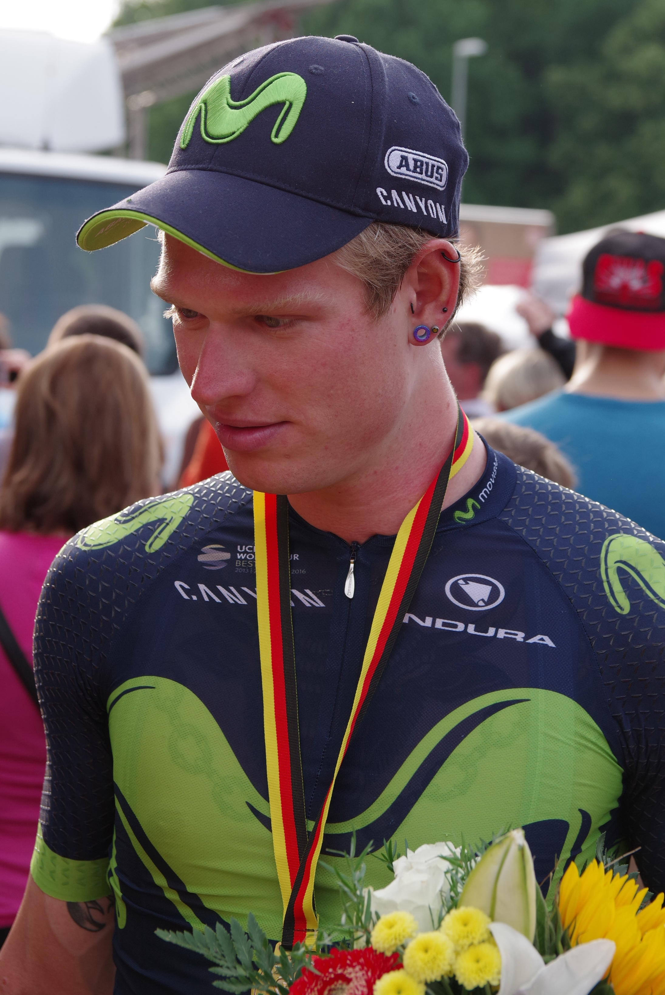 Deutsche Meisterschaften im Einzelzeitfahren 2017 23. Juni 2017 The making of this document was supported by the Community-Budget of Wikimedia Germany.